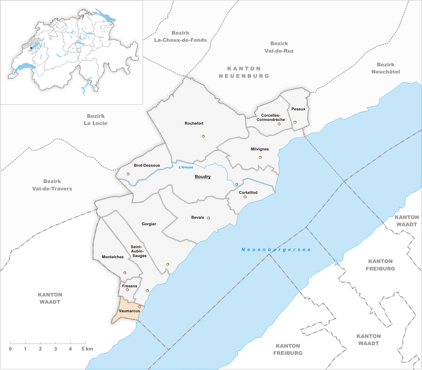 Municipality Vaumarcus